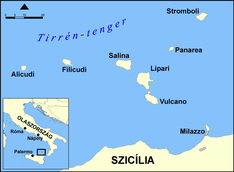 Lipari-szigetek térképvázlata